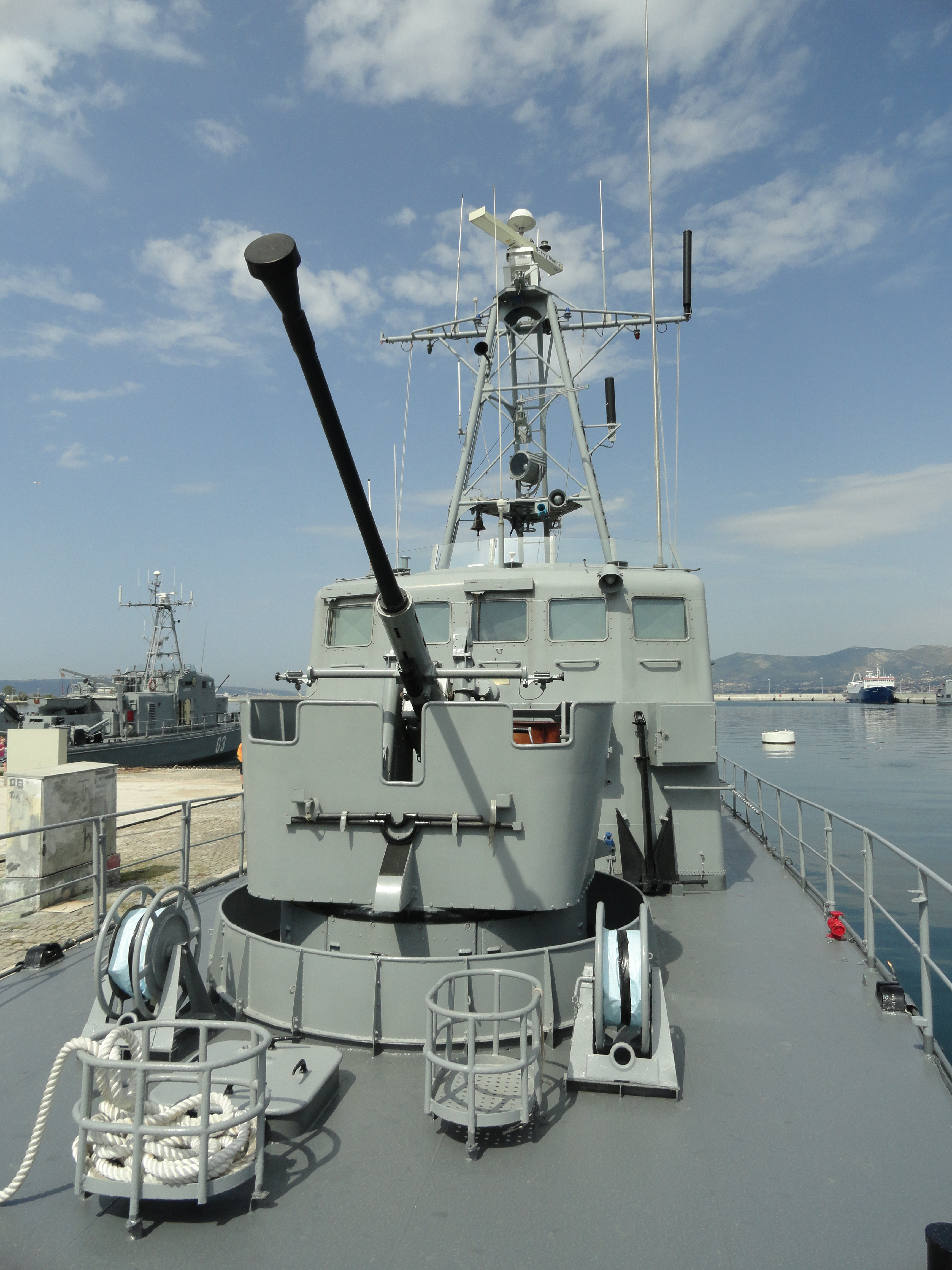 OB-02 Šolta u Lori.